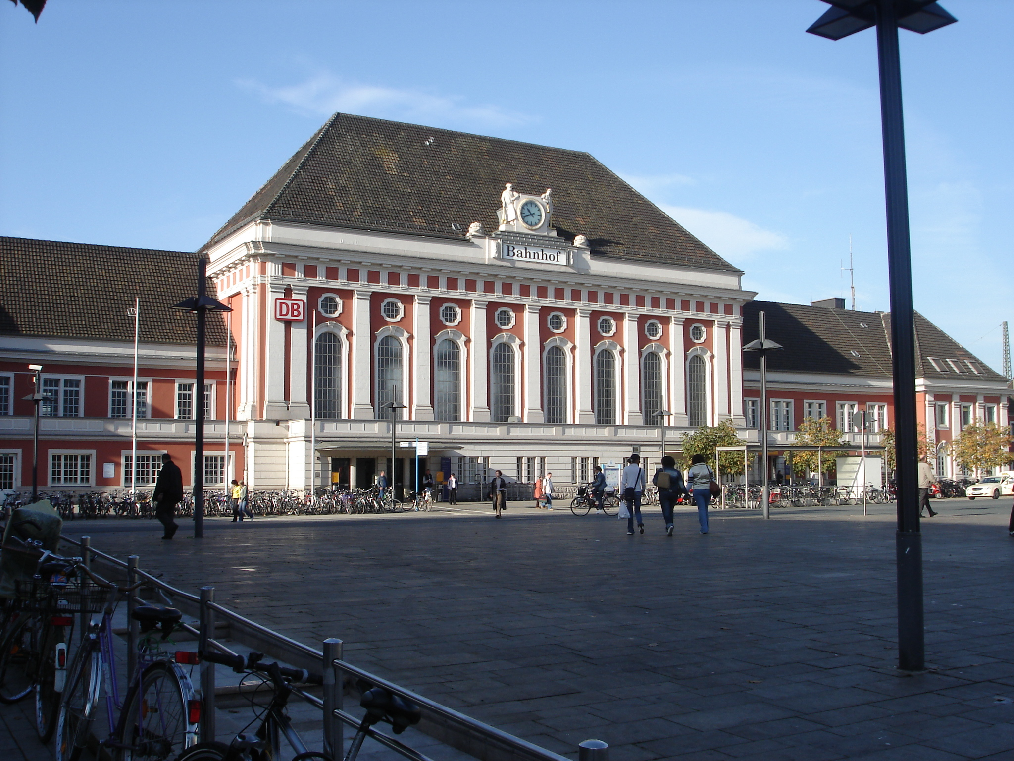 Česky: Nádražní budova v Hammu, Vestfálsko, Německo